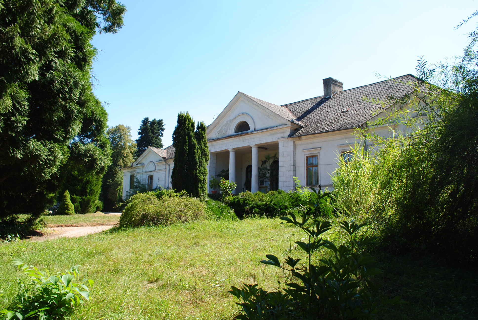 Ansamblul castelului Bella Fay, înc. sec. XIX